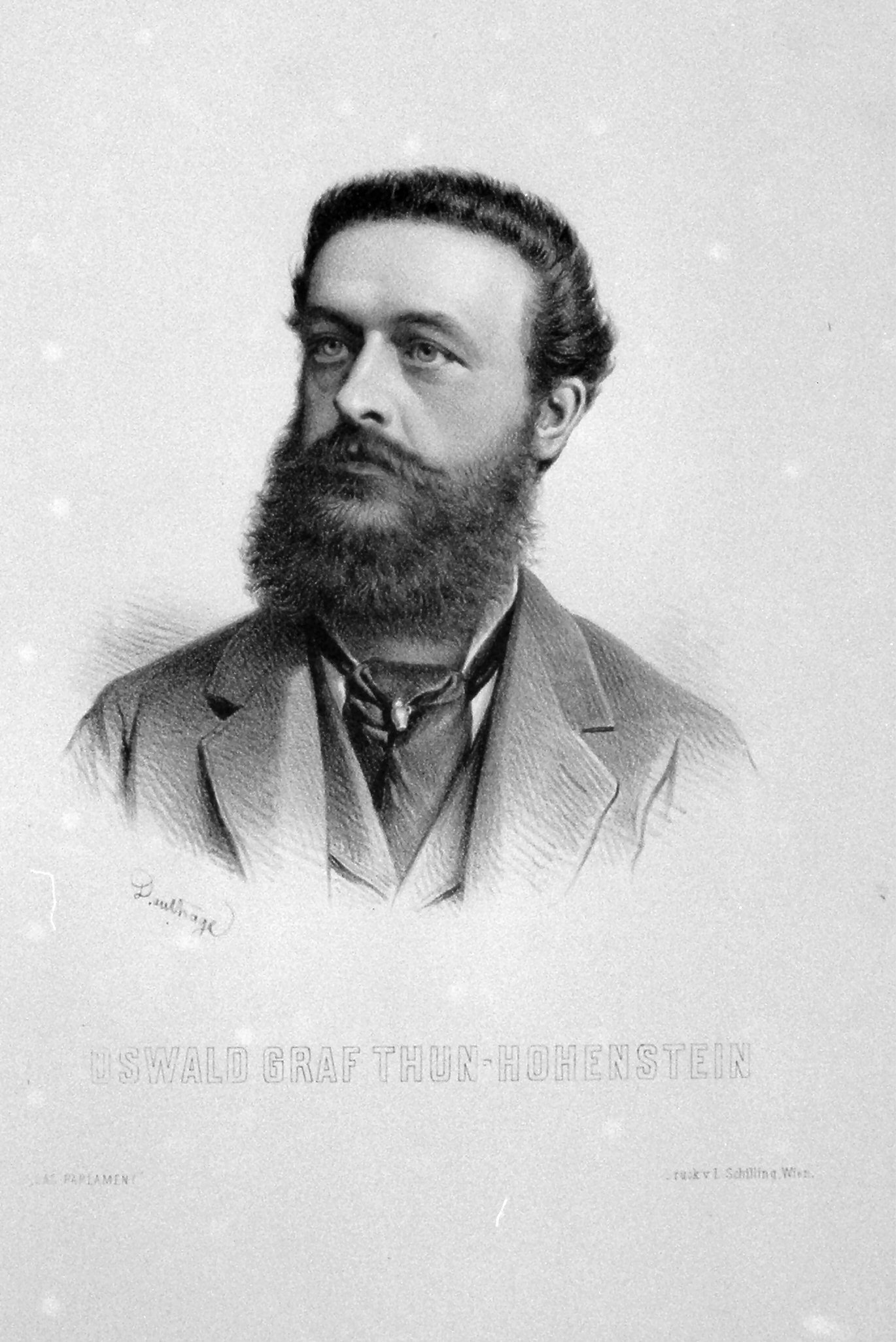 Josef Oswald jun. von Thun und Hohenstein (1849-1913), Graf, Jurist, Diplomat, Abgeordneter zum böhmischen Landtag. Lithographie von Adolf Dauthage, 1880